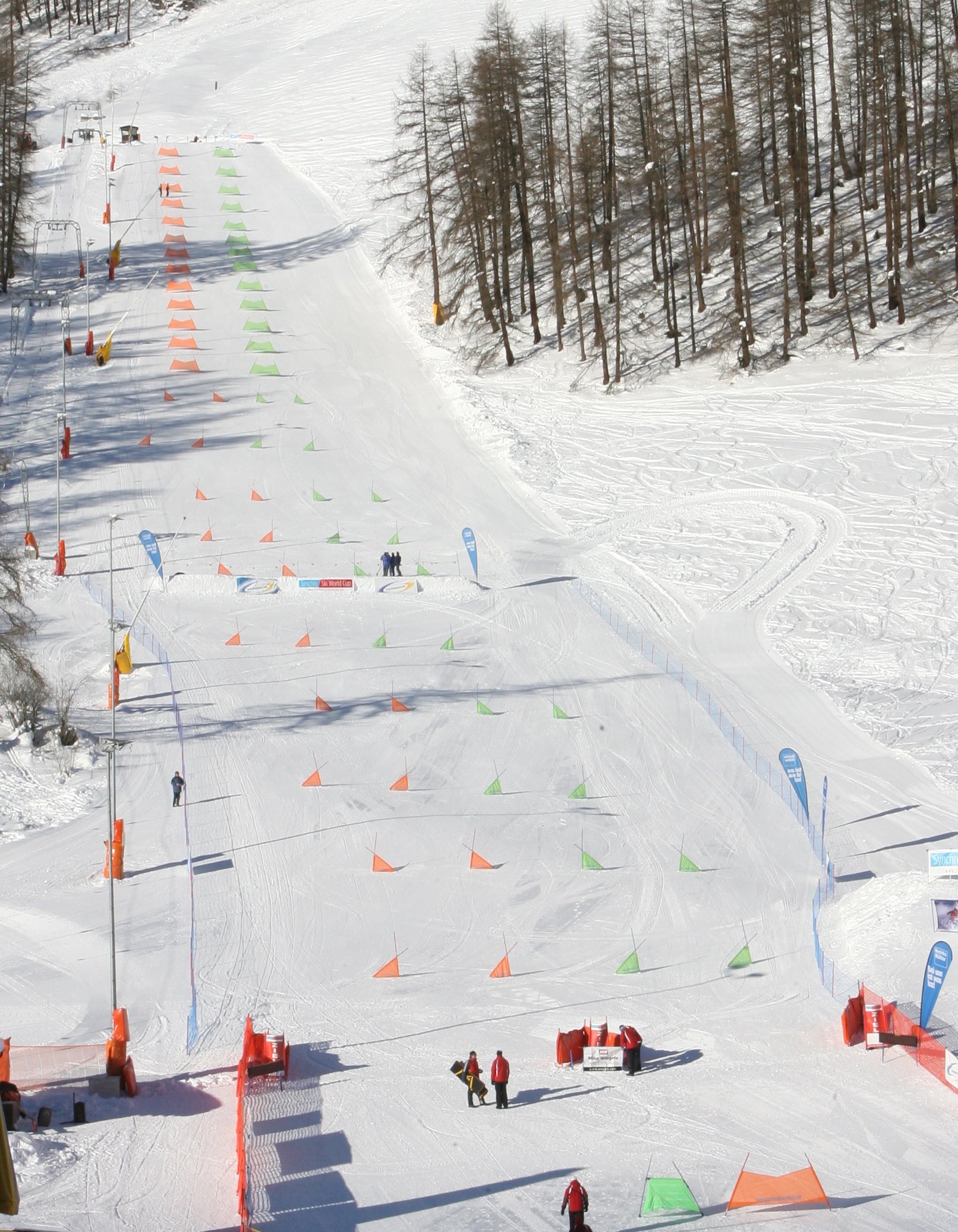 Synchrohang